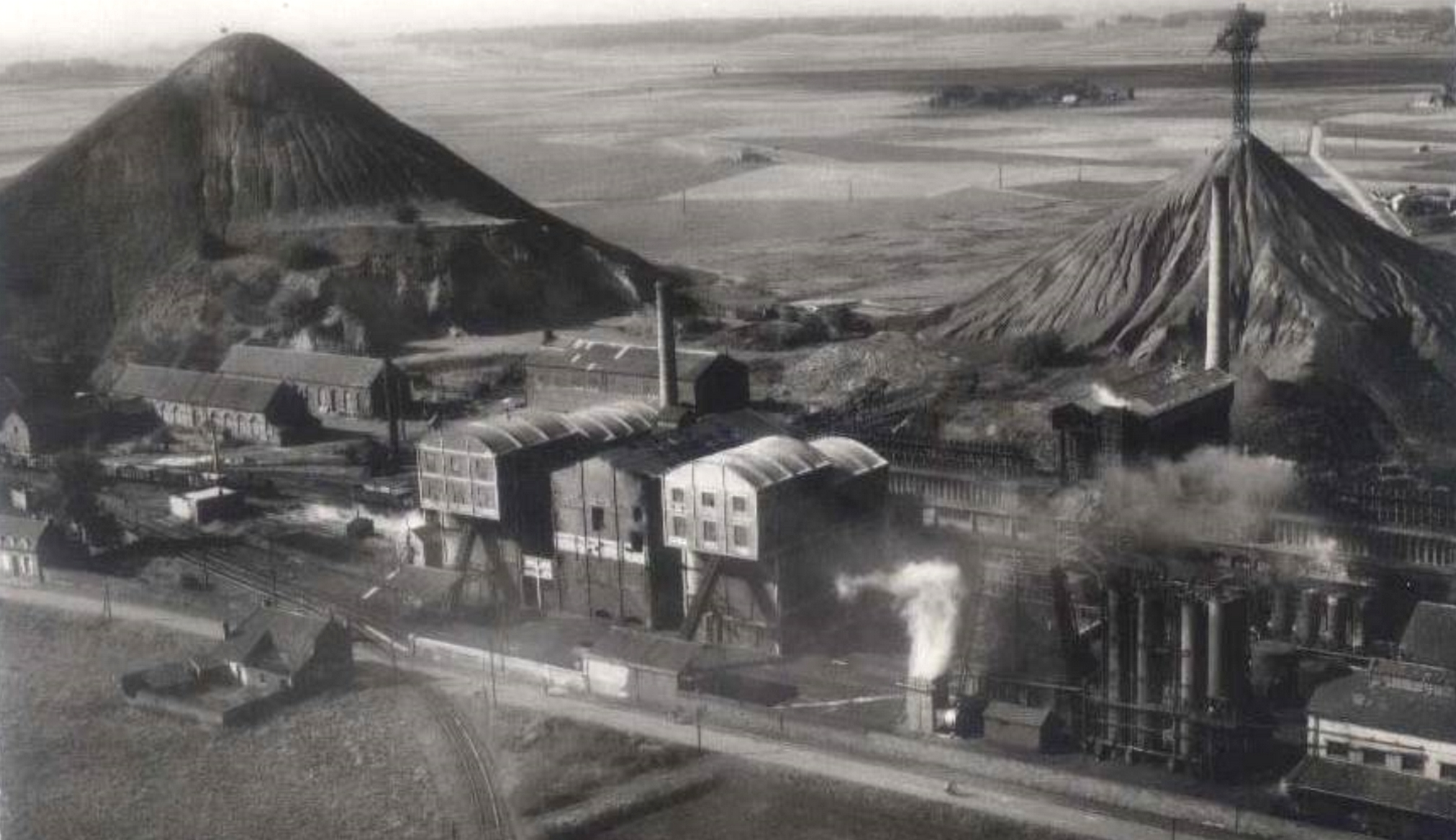 Terril n° 227 dit 3 d'Azincourt, Fosse n° 3 de la Compagnie des mines d'Azincourt, Monchecourt, Nord, Nord-Pas-de-Calais, France.